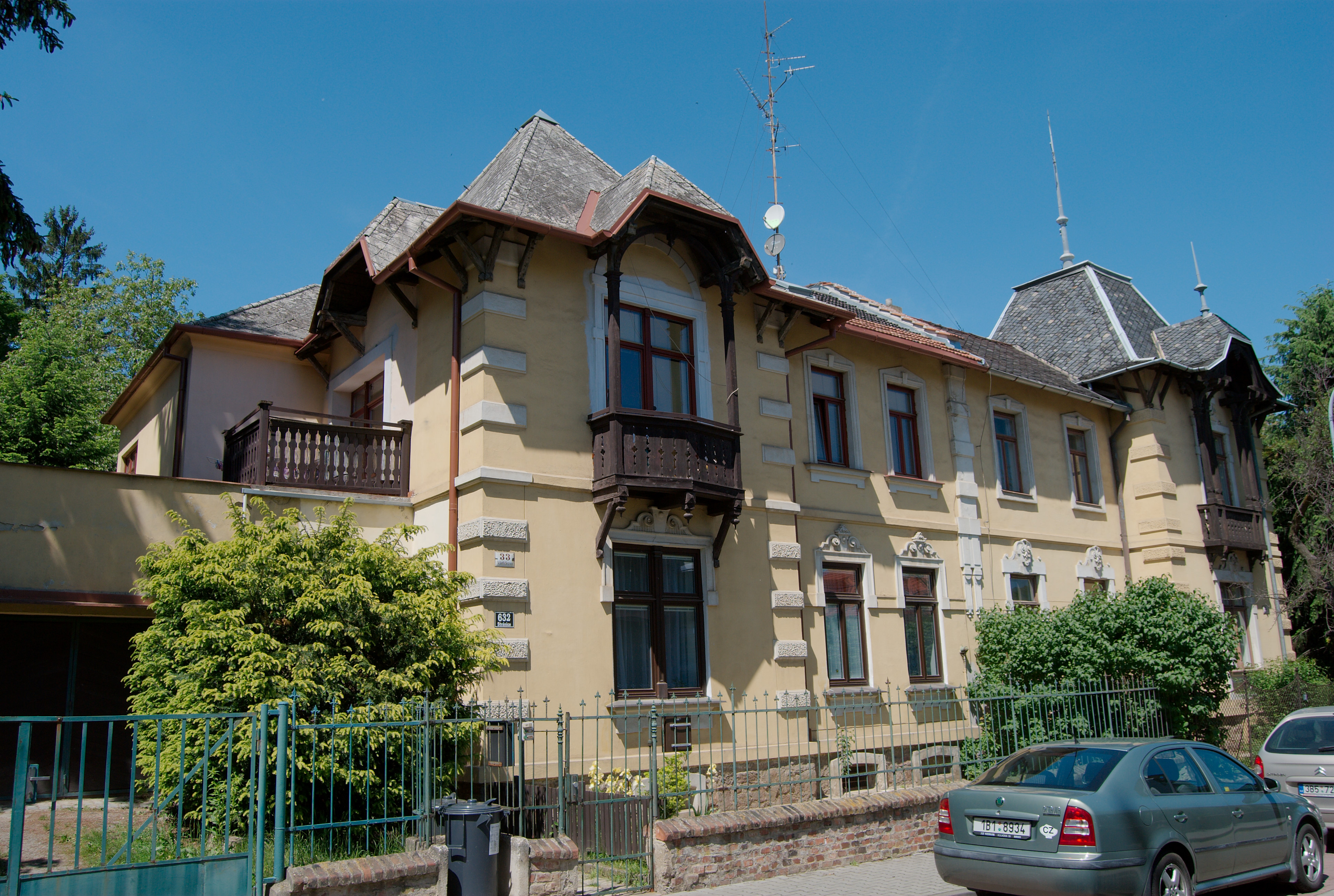 Brno-Masarykova čtvrť - původní německý dům Všetičkova 33